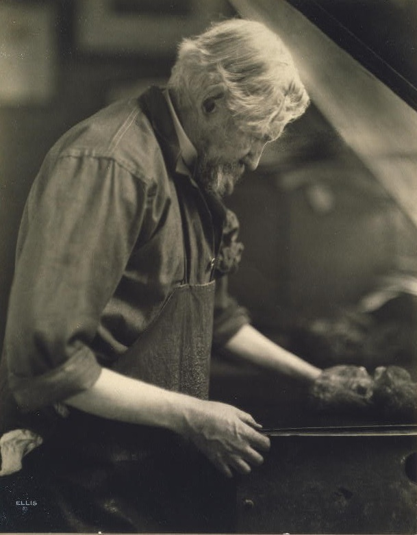 Artist Joseph Pennell